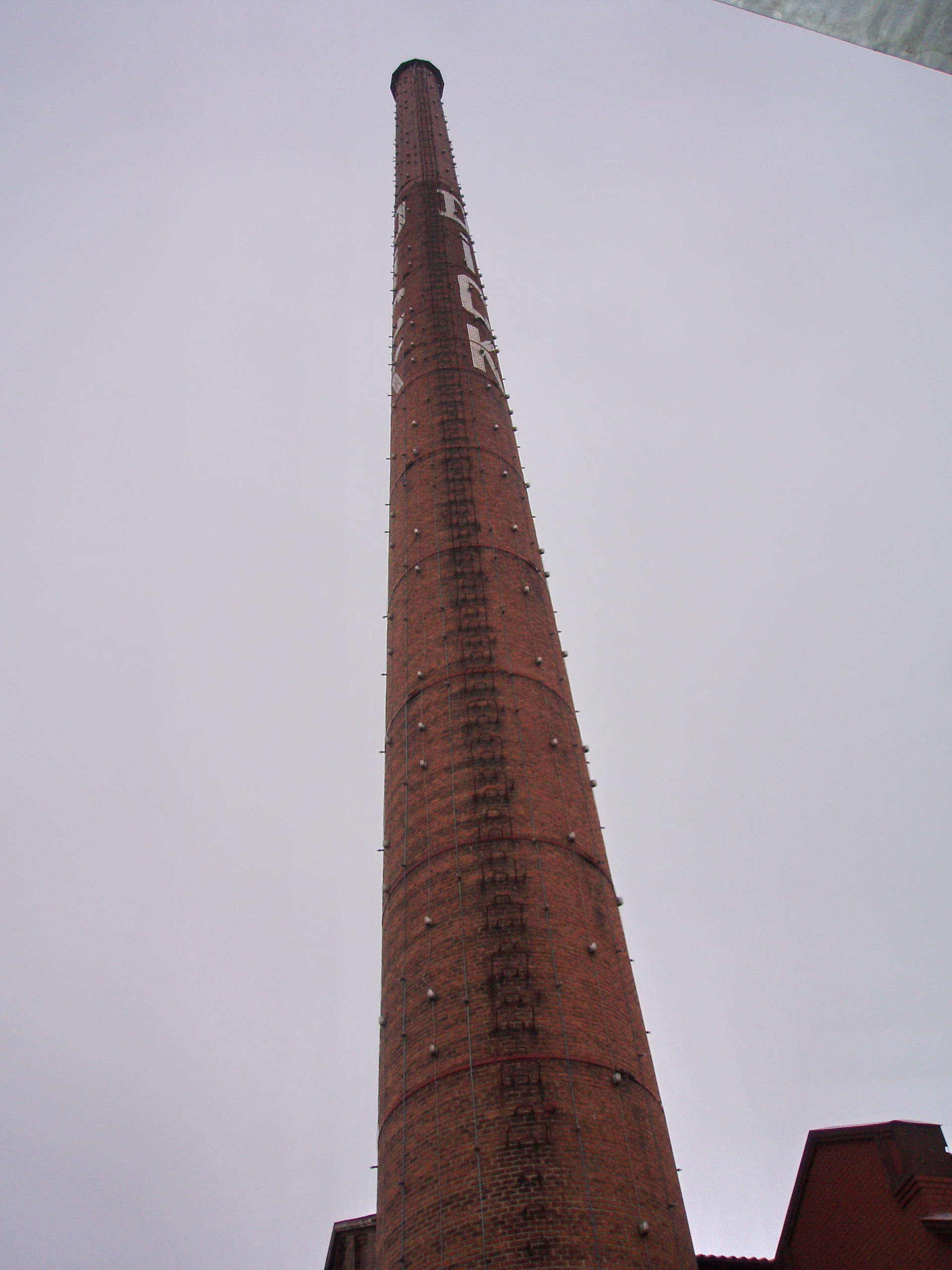 Kamin der ehemaligen Fabrik Dick